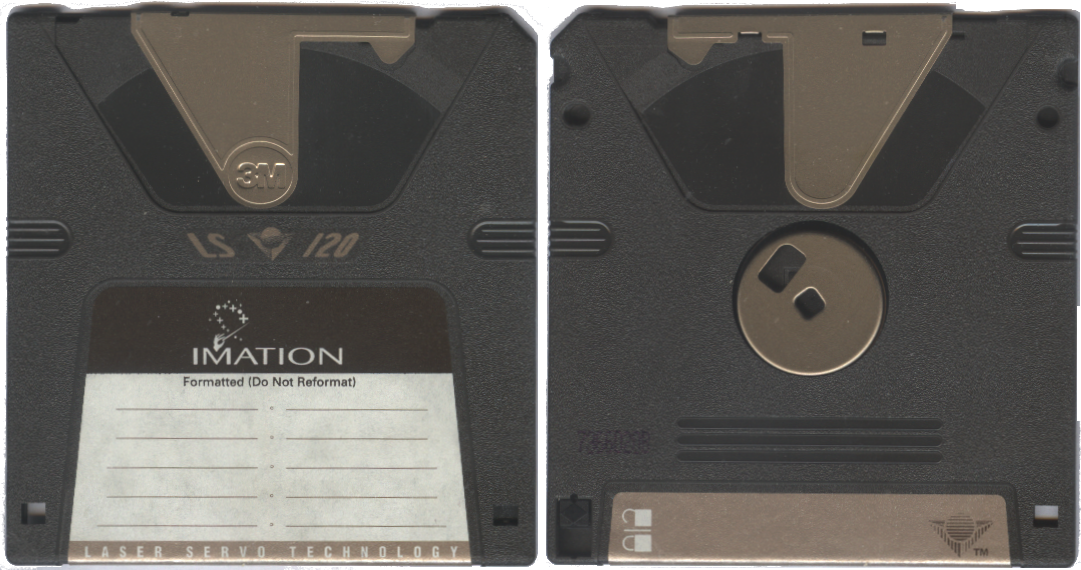 Consumible SuperDisk de 3M Imation